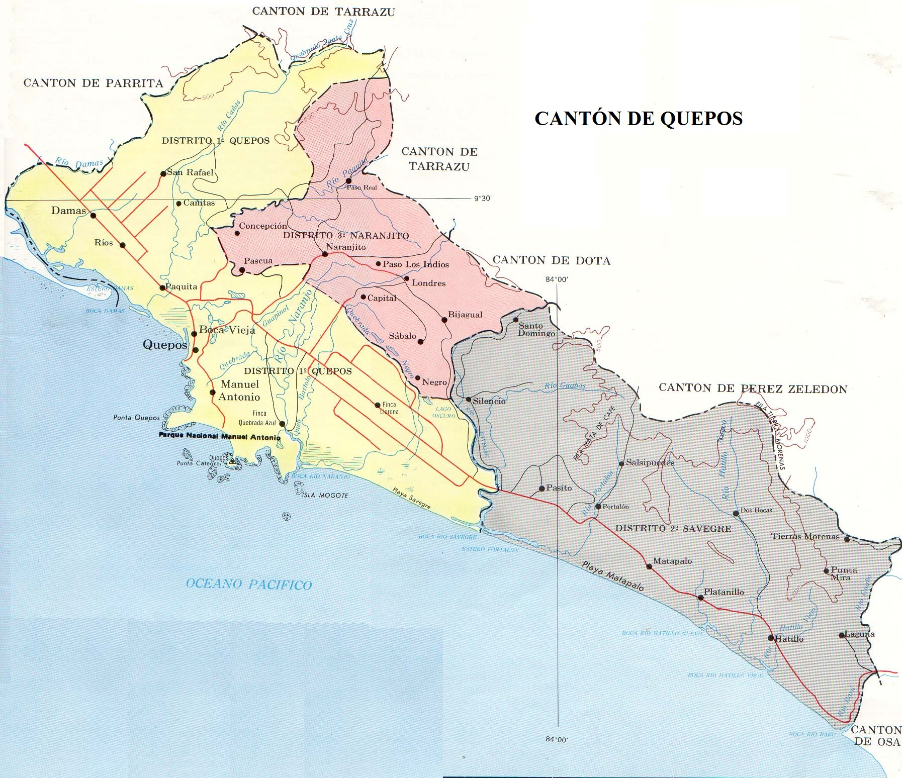 Cantón de Quepos